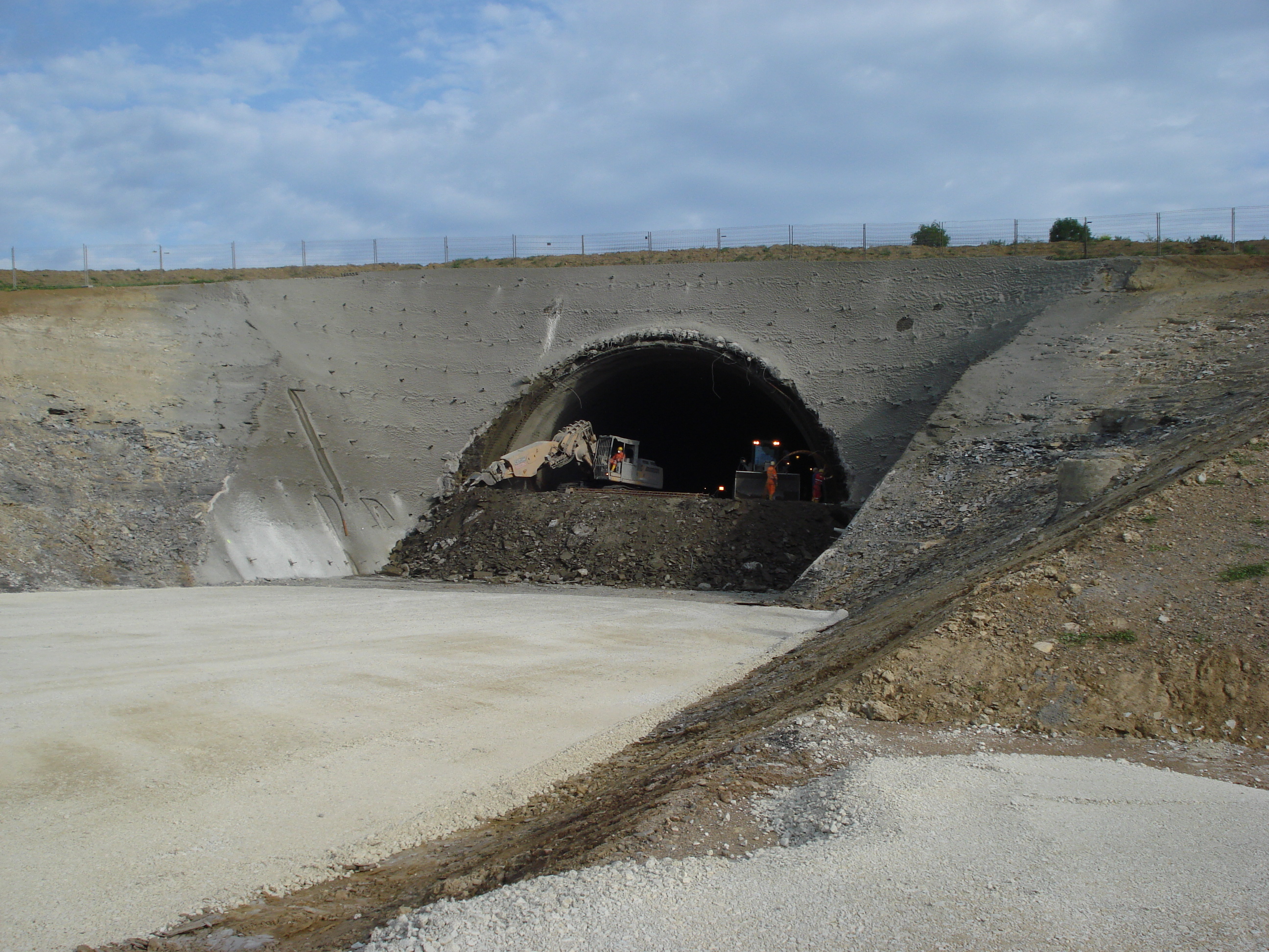 Das Südportal des Tunnel Eierberge der Neubaustrecke Ebensfeld-Erfurt nahe Lichtenfels kurz nach dem technischen Durschlag.